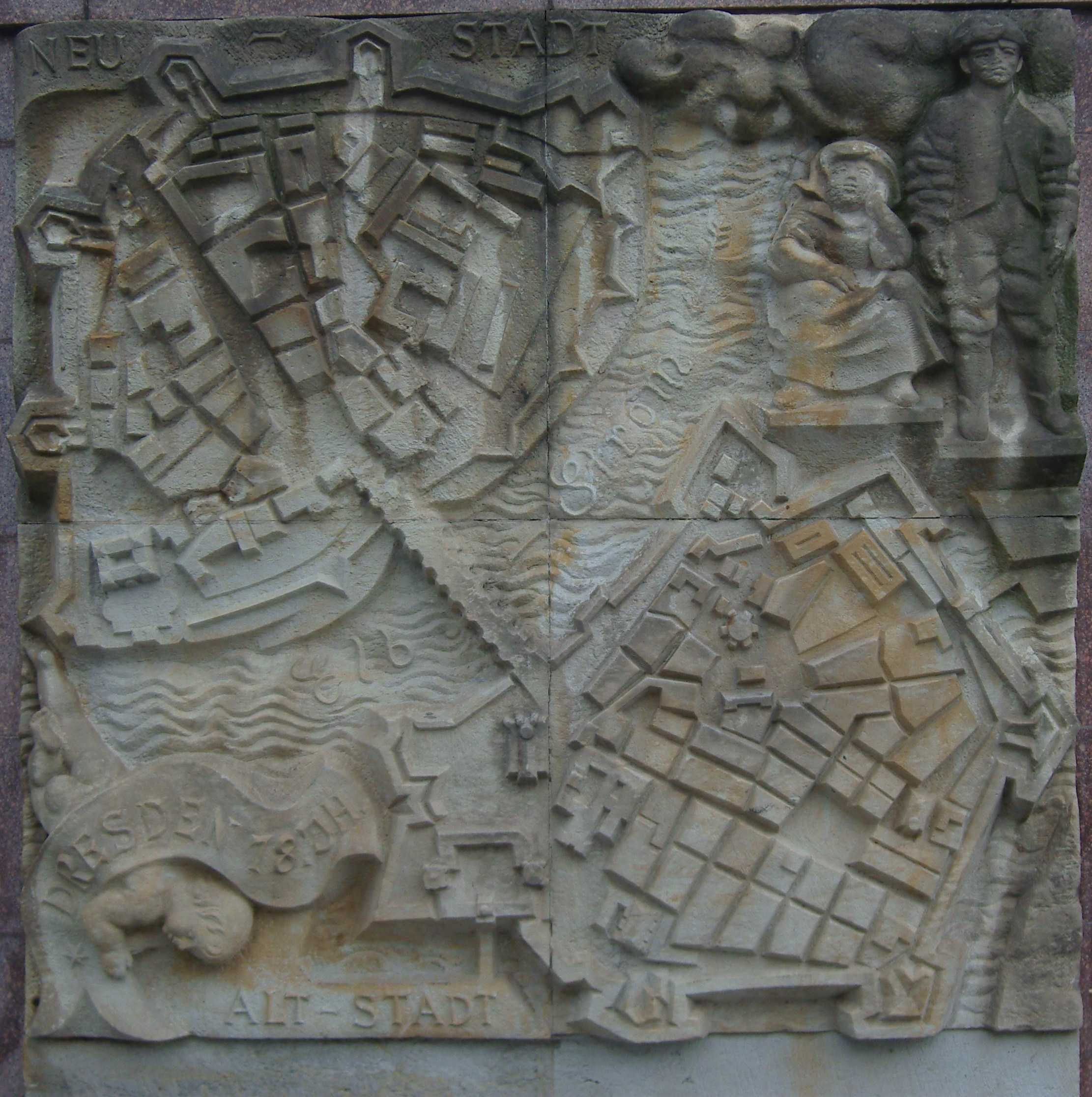 Relief von Egmar Ponndorf am Fussgängertunnel am Neustädter Markt in Dresden aus dem Jahr 1979, dargestellt sind Altendresden und die Dresdner Altstadt im 18. Jahrhundert